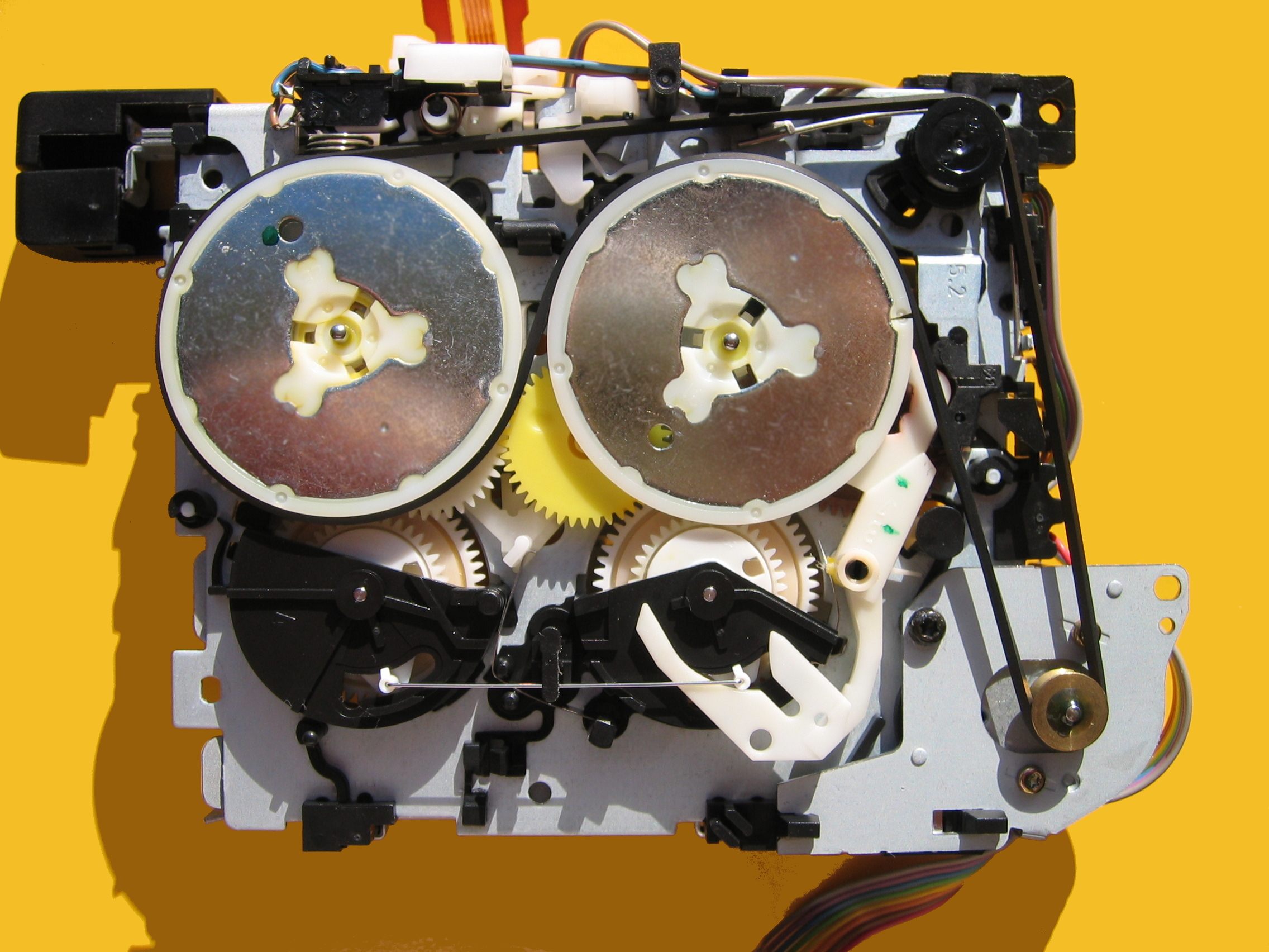 Antrieb der Laufwerksmechanik ohne Tonwellen und Riemenscheiben